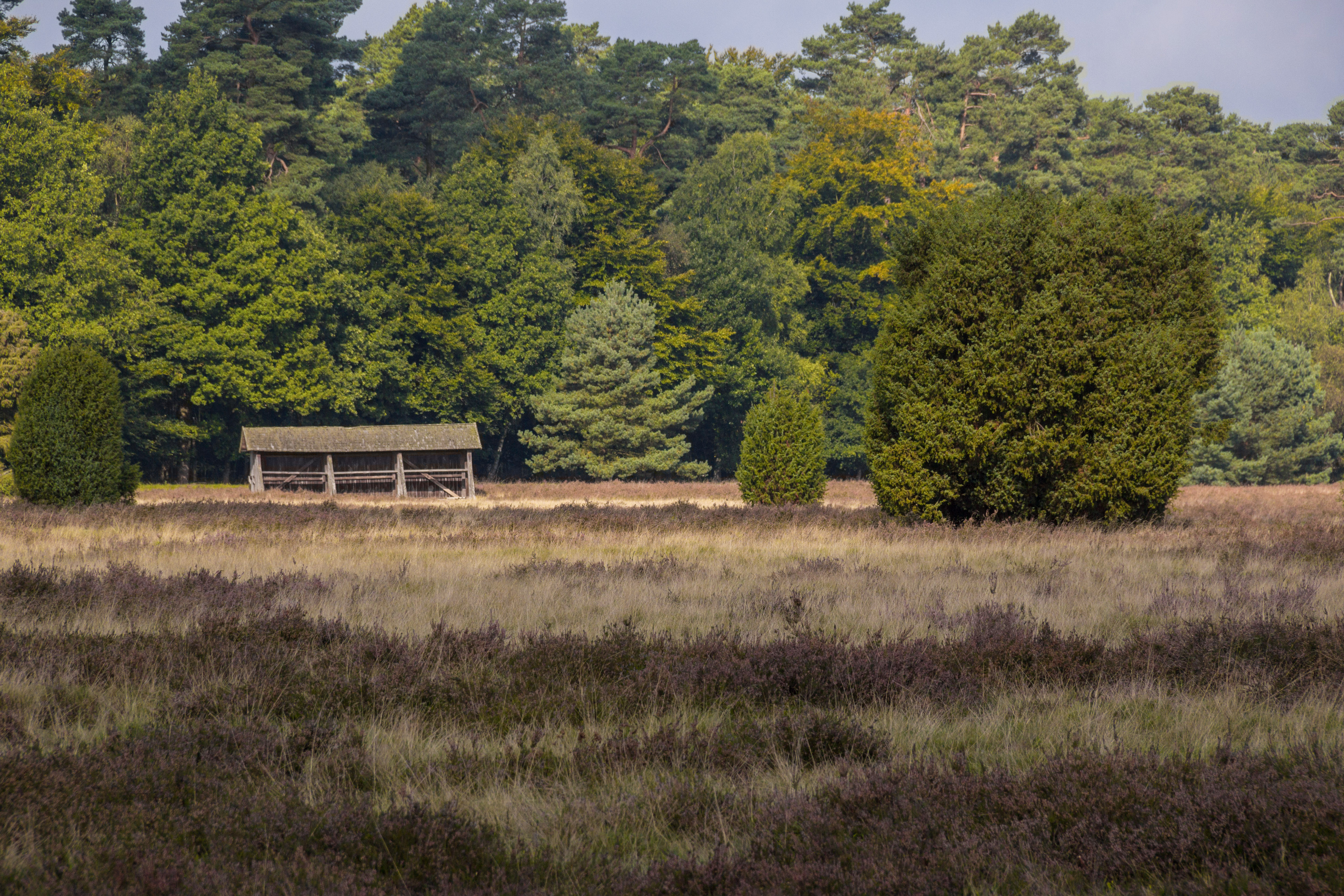 Lüneburger Heide, Undeloh, Naturschutzgebiet, FFH-Gebiet Lüneburger Heide, Vogelschutzgebiet Lüneburger Heide, Naturpark